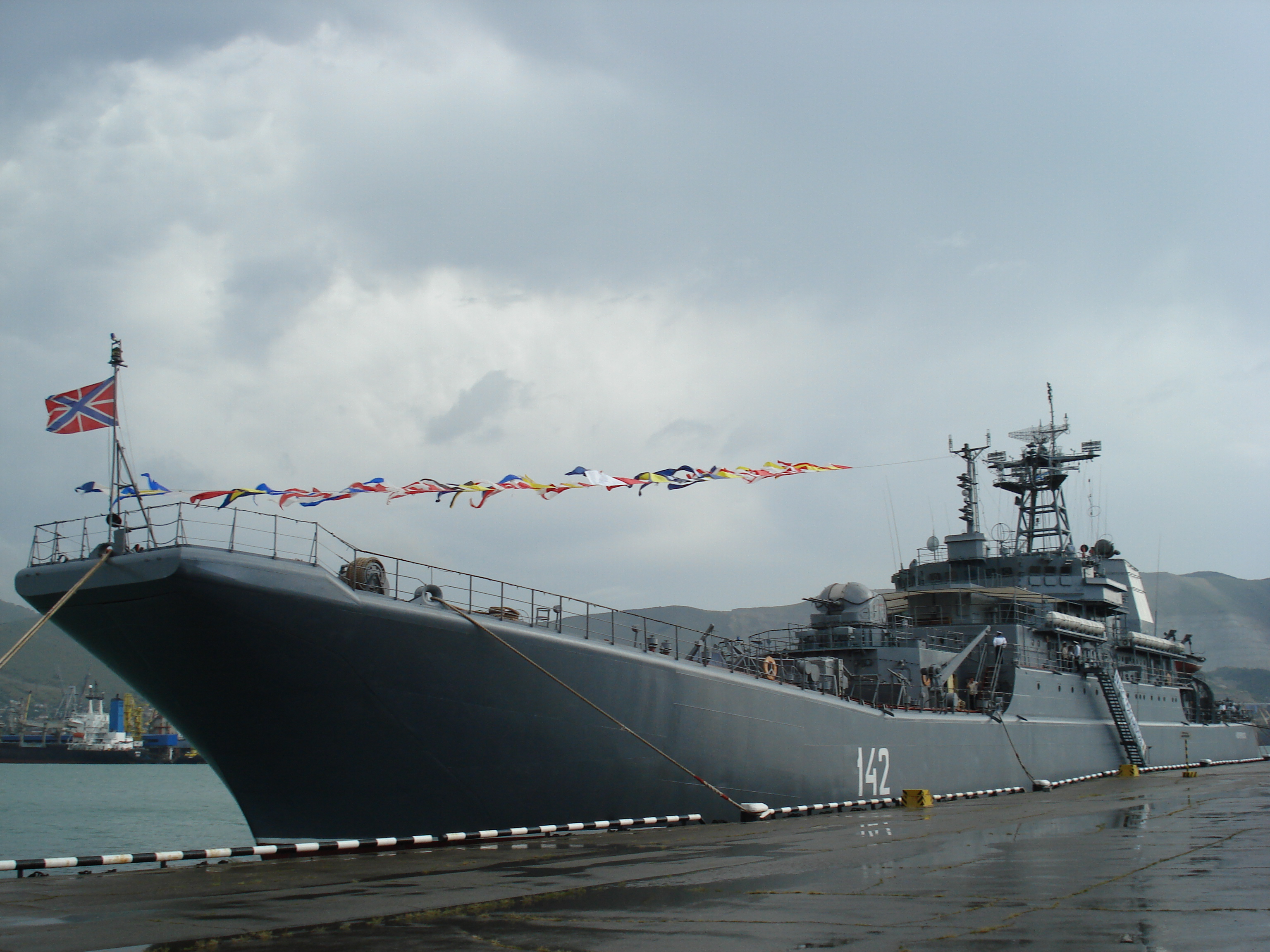 Большой десантный корабль «Новочеркасск» в порту города Новороссийск.